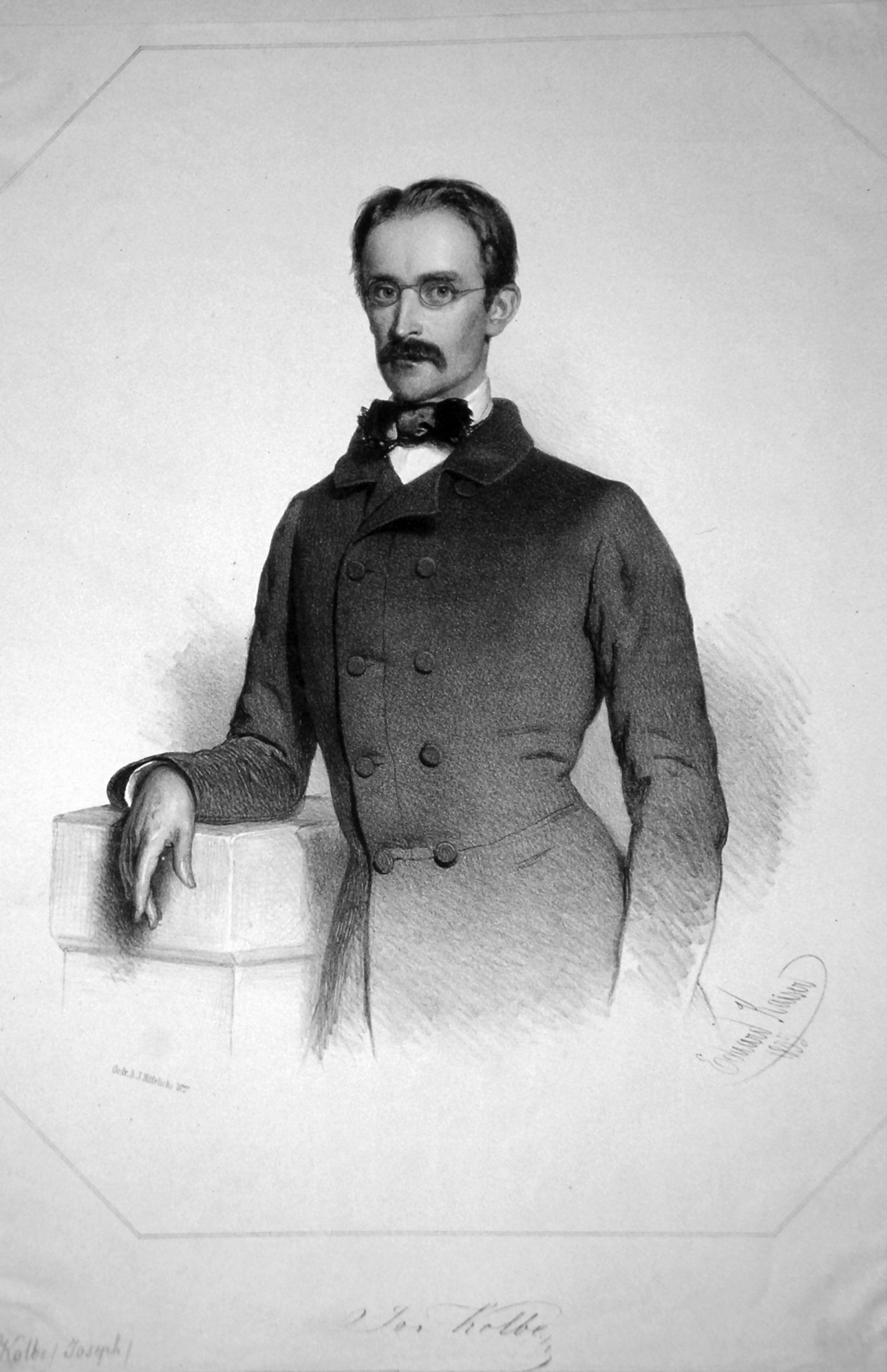 Josef Kolbe (1825-1807), österreichischer Mathematiker. Lithographie von Eduard Kaiser, 1856